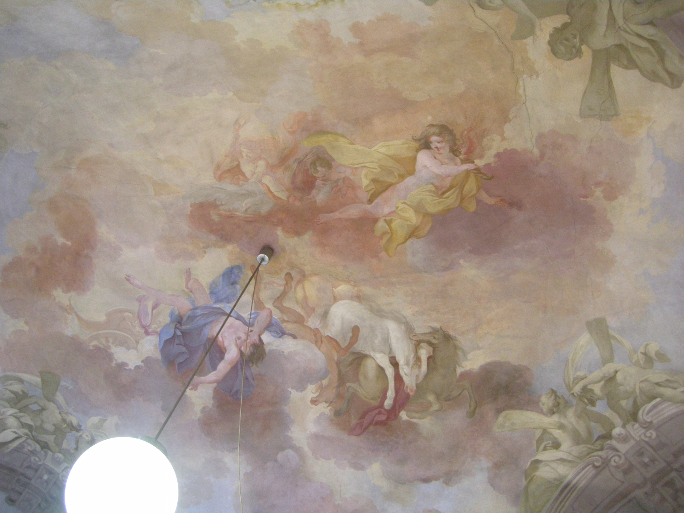 Palazzo capponi-covoni, salette affrescate